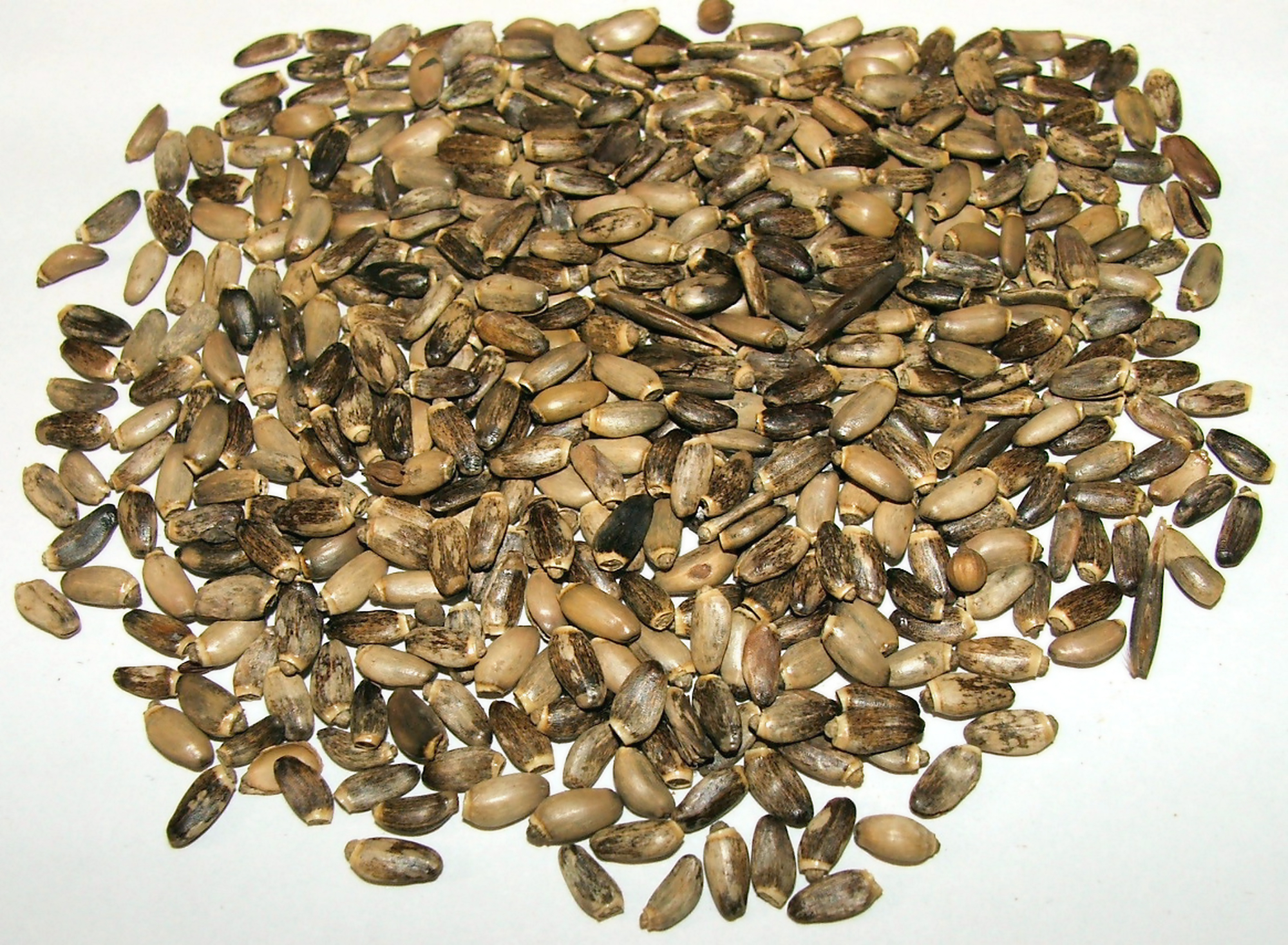 Silybum marianum fructus